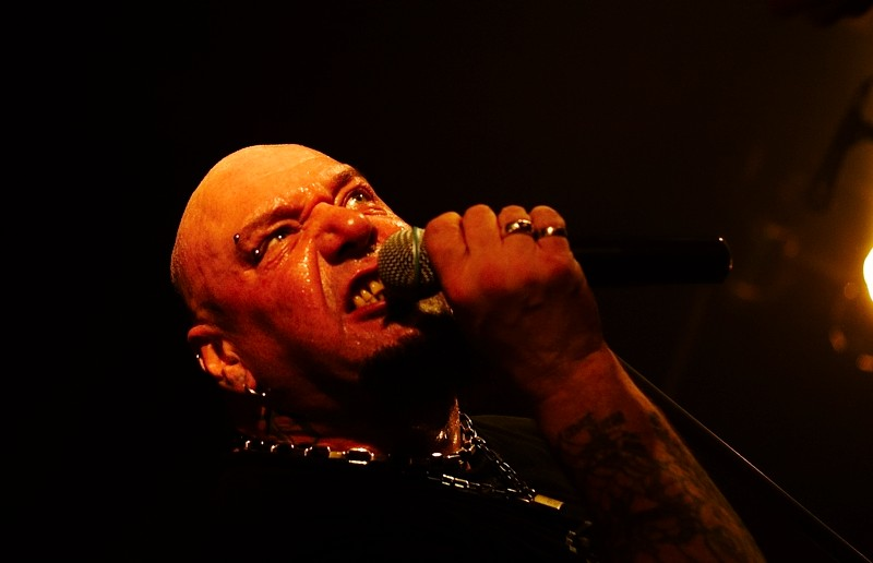 Paul Di'Anno, koncert w klubie Pod Palmą, Rzeszów 2006.